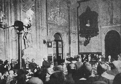 Julgamento do famoso ilegalista Ravachol na corte de Montbrison.